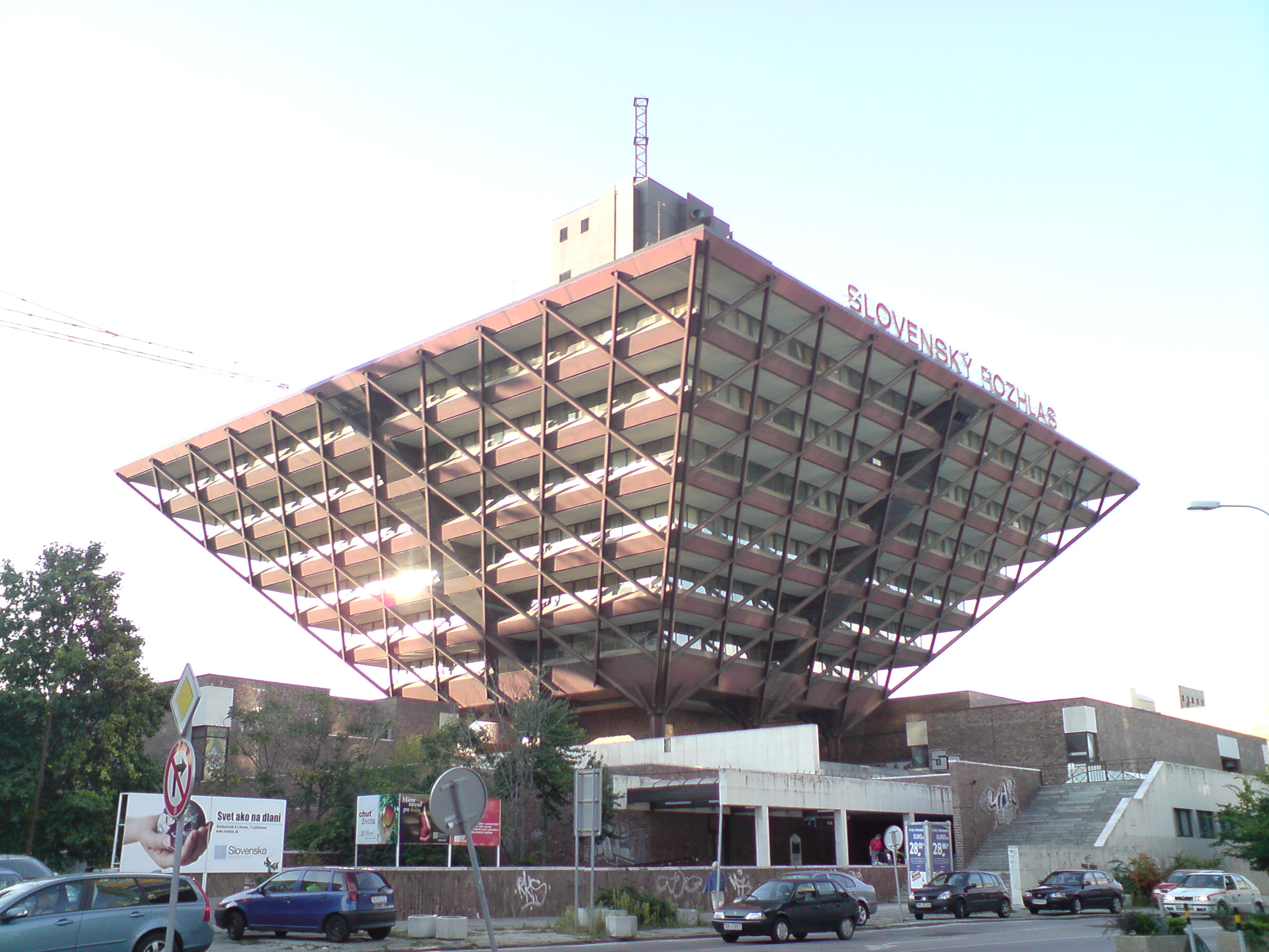 Slovenský rozhlas